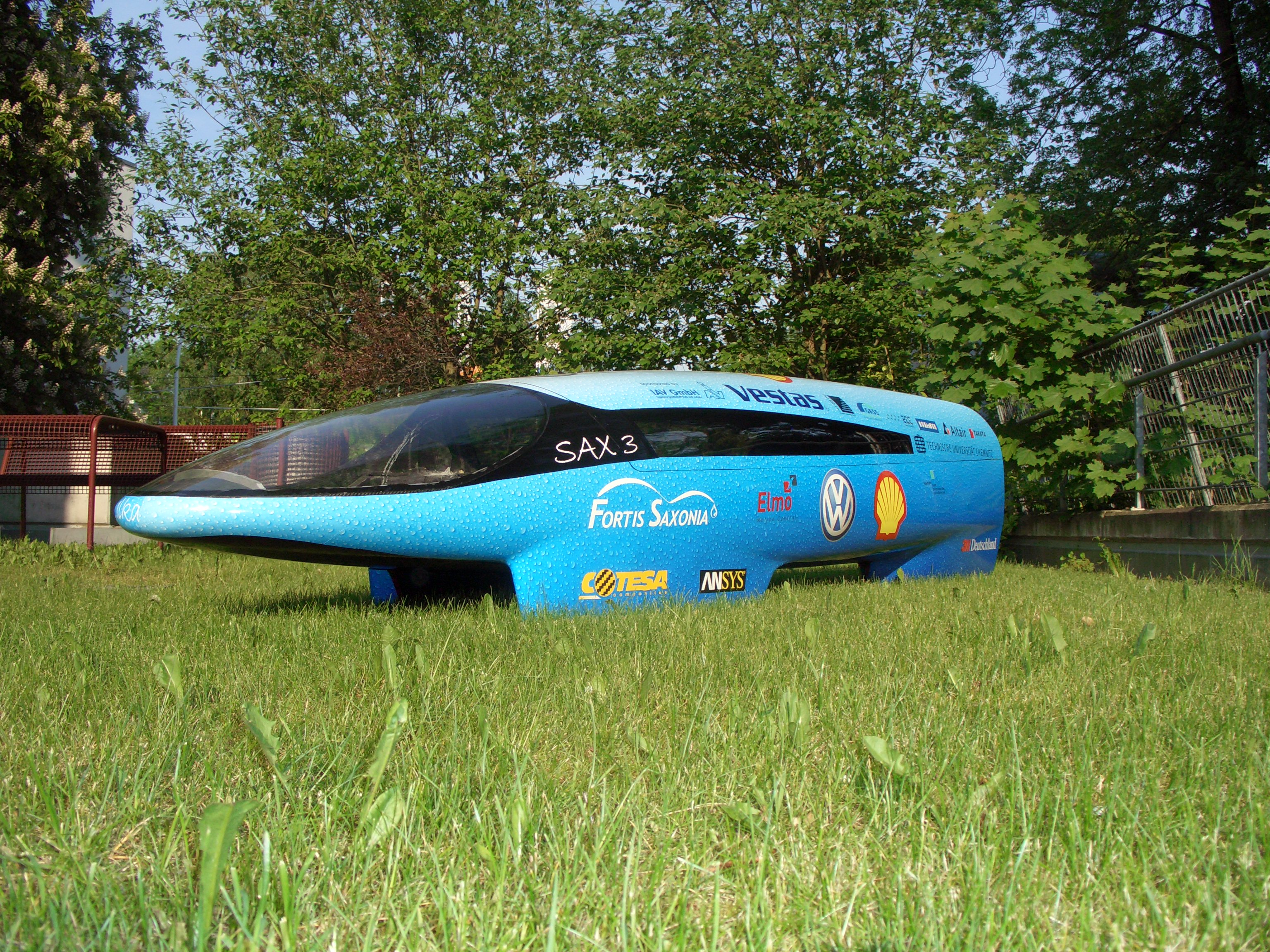 Sax 3 Kurz nach dem Bekleben